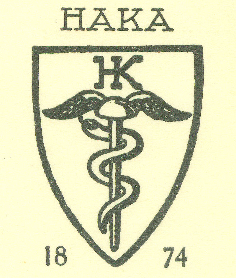 Briefkopf von 1939